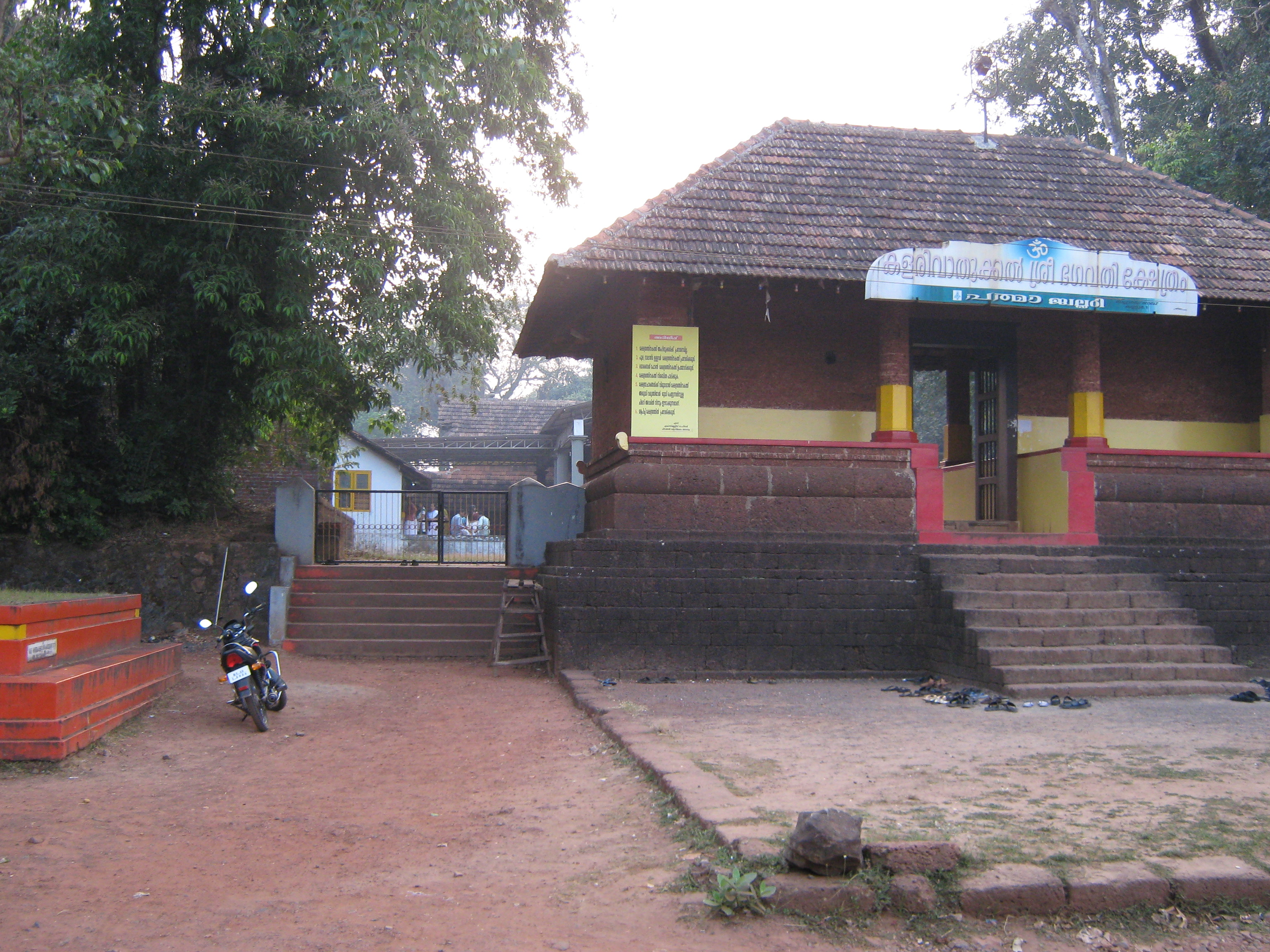 Kannur, Kerala, India.